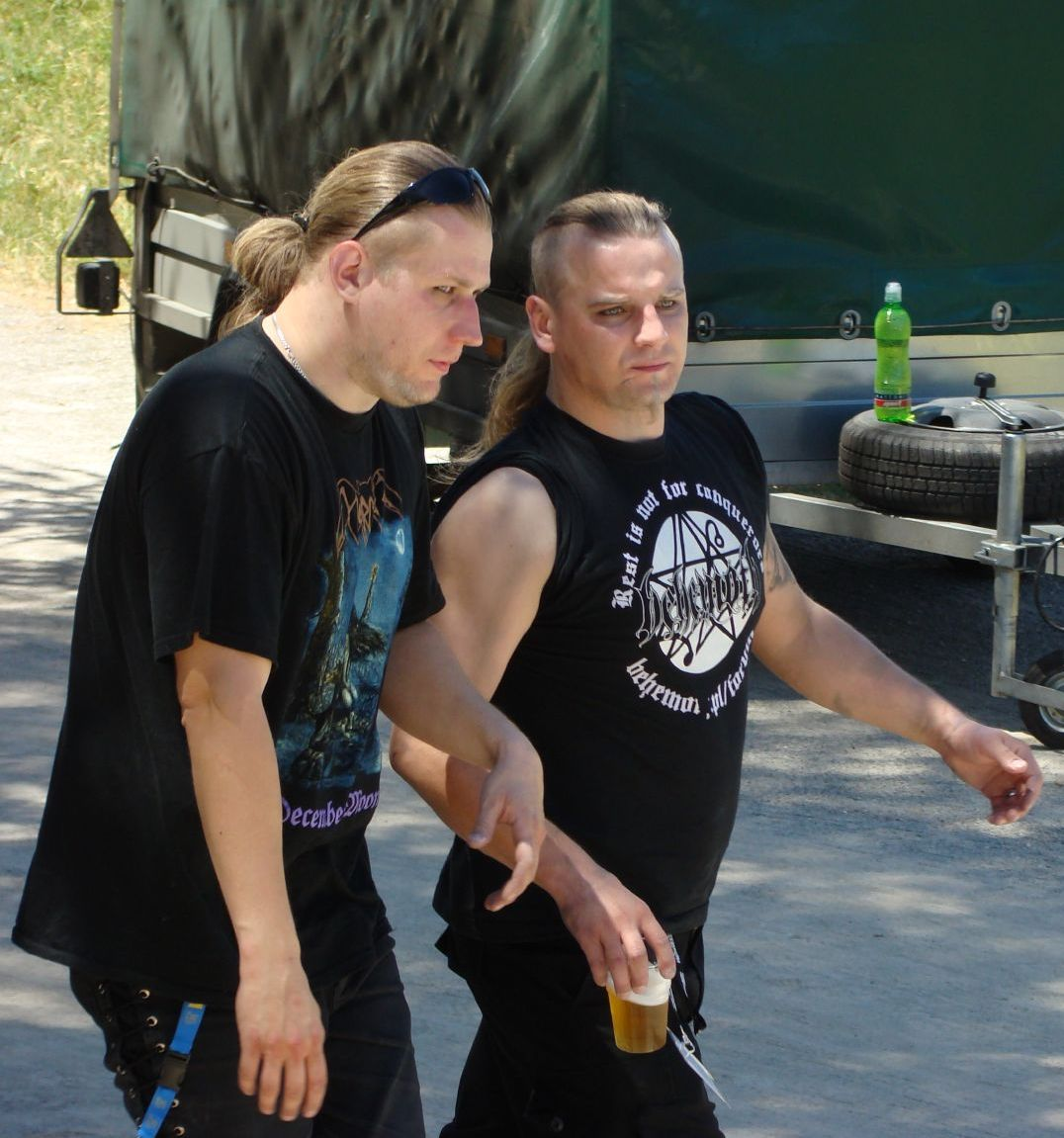 Zbigniew "Inferno" Promiński and Patryk Dominik "Seth" Sztyber